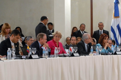 Presidentes de América Latina en la XX Cumbre del Grupo de Rio.